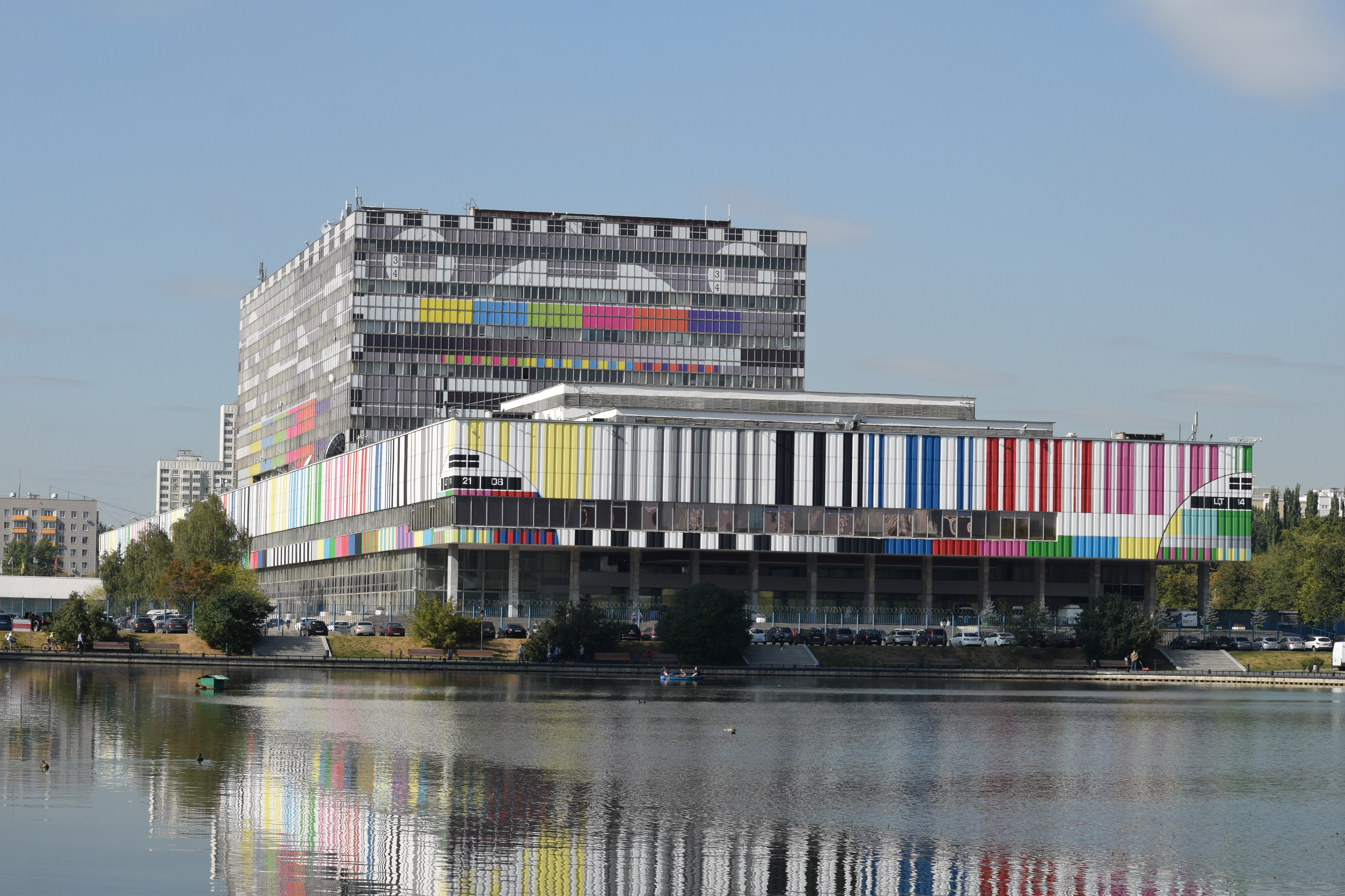 Телецентр «Останкино» в сентябре 2018 года.